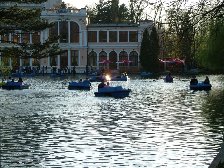 Central Park of Cluj-Napoca, Romania